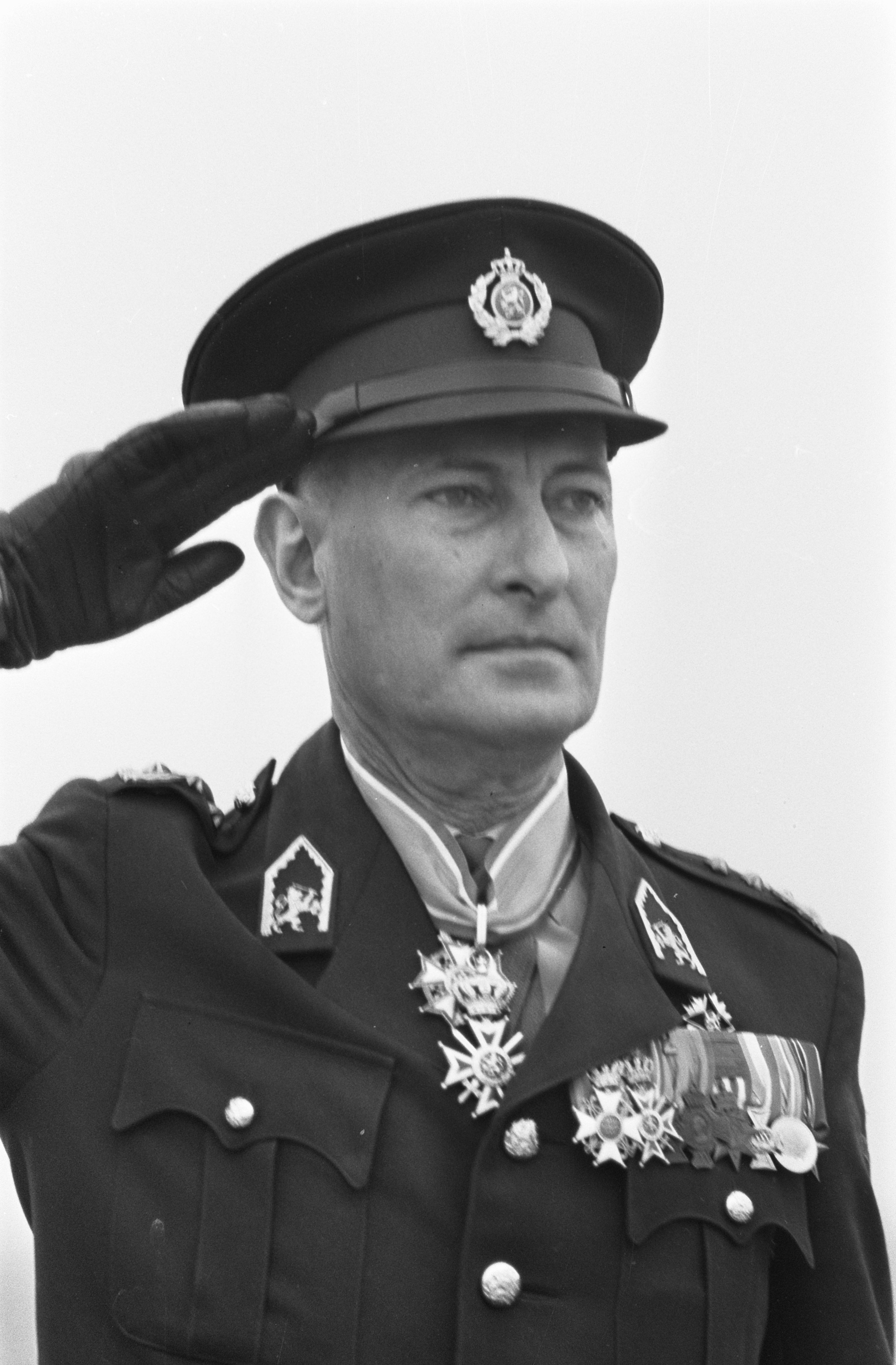 Collectie / Archief : Fotocollectie Anefo Reportage / Serie : [ onbekend ] Beschrijving : Afscheid luitenant-generaal F. v.d. Veen als bevelhebber landstrijdkrachten op de Vlasakkers luitenant-generaal F. van der Veen , kop / Datum : 18 december 1968 Trefwoorden : AFSCHEID, bevelhebbers Persoonsnaam : F. van der Veen Fotograaf : Koch, Eric / Anefo Auteursrechthebbende : Nationaal Archief Materiaalsoort : Negatief (zwart/wit) Nummer archiefinventaris : bekijk toegang 2.24.01.05 Bestanddeelnummer : 921-9527